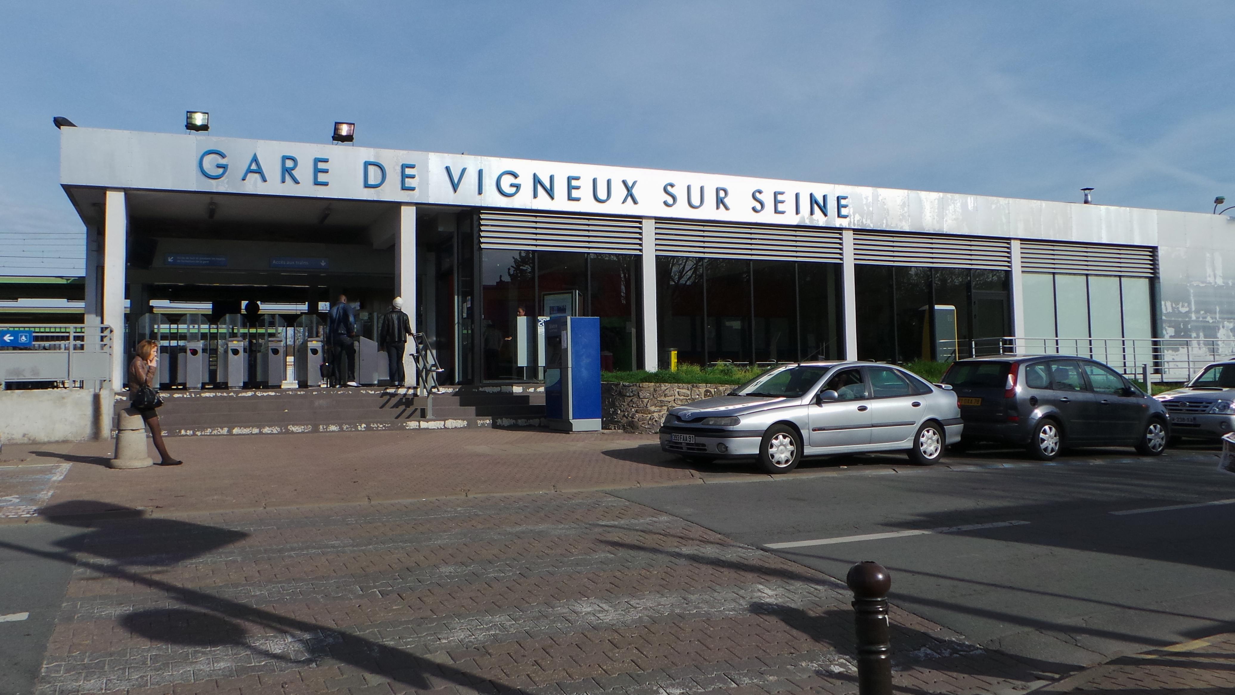 Gare de Vigneux-sur-Seine (Essonne, France).